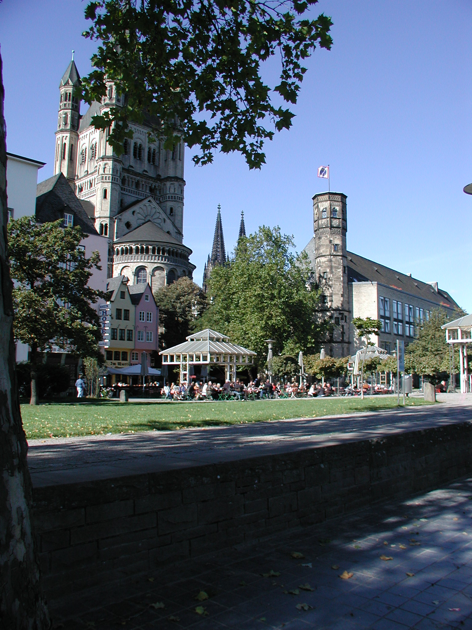 Koeln-Altstadt